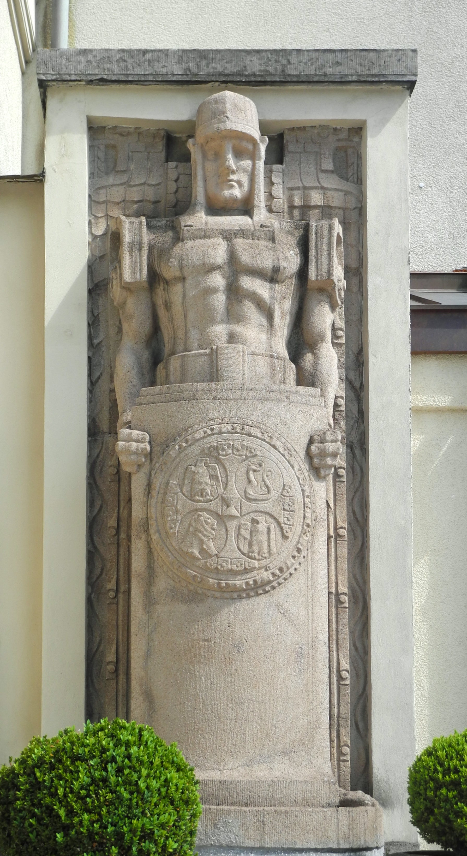 Krematorium in Reichenberg – Liberec, U Krematoria 460/7, errichtet 1915–1917, Architekt: Rudolf Bitzan, rechte Wächterstatue vom Bildhauer Alois Rieber (1876-1944). Auf dem Schild sind in vier Kreisen die Symbole Eule, Schlange, Löwe und Adler dargestellt, die den Schlaf, die Wiedergeburt, Tapferkeit und Kraft darstellen.